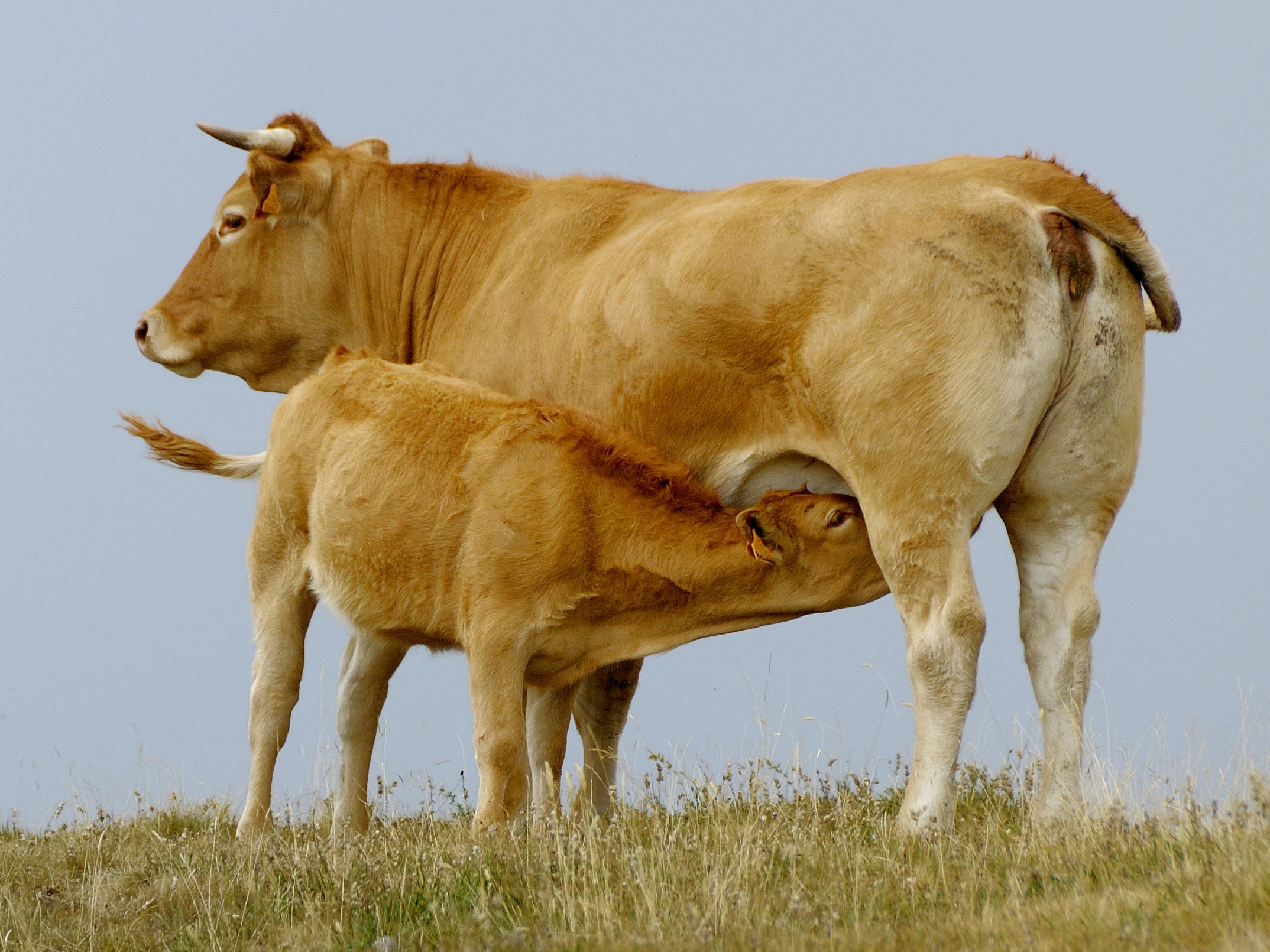 Vache de race aubrac et son veau sur le plateau d'Aubrac